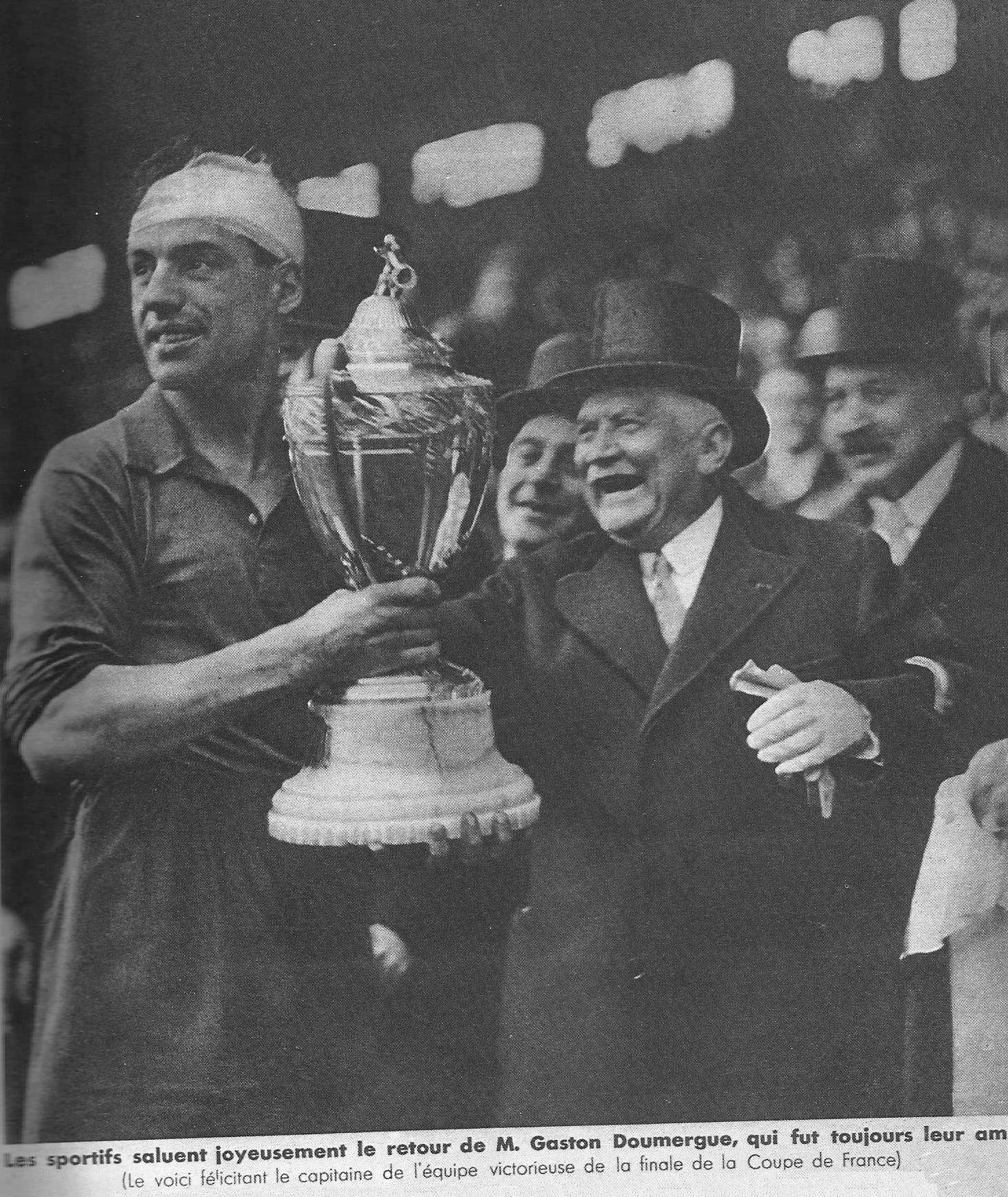 Remise de la Coupe de France de football en 1931 par le président de la République Gaston Doumergue